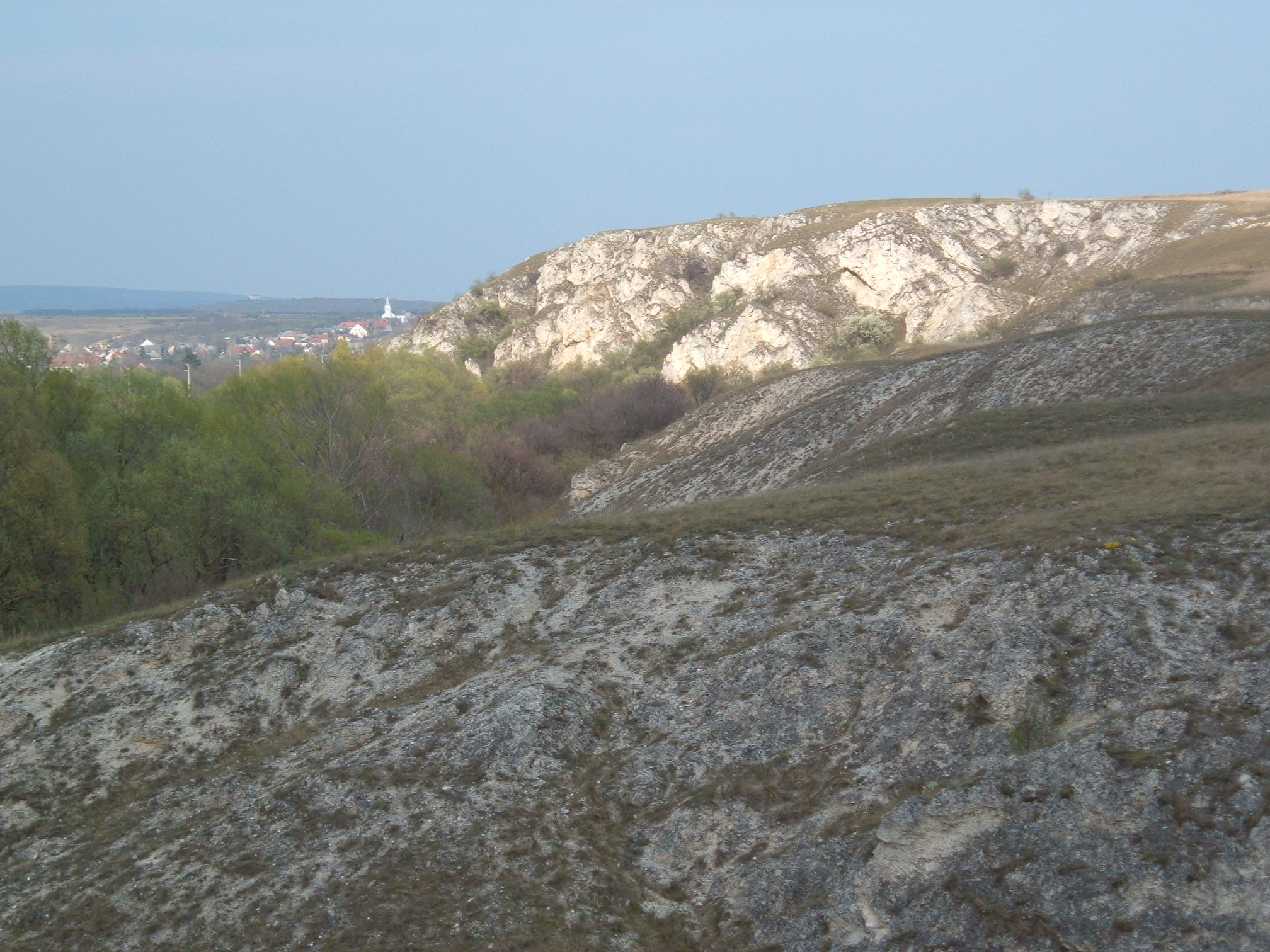 Látkép a Geleméri-fennsíkról Hajmáskér felé